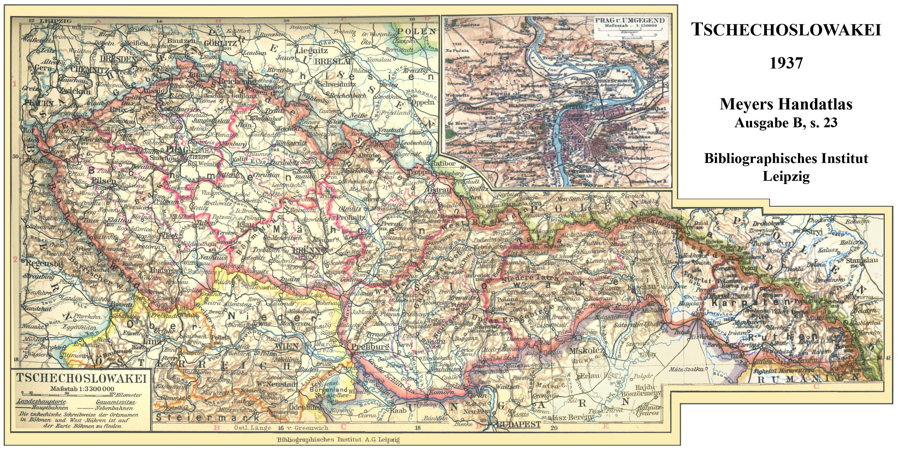 Tschechoslowakei 1937